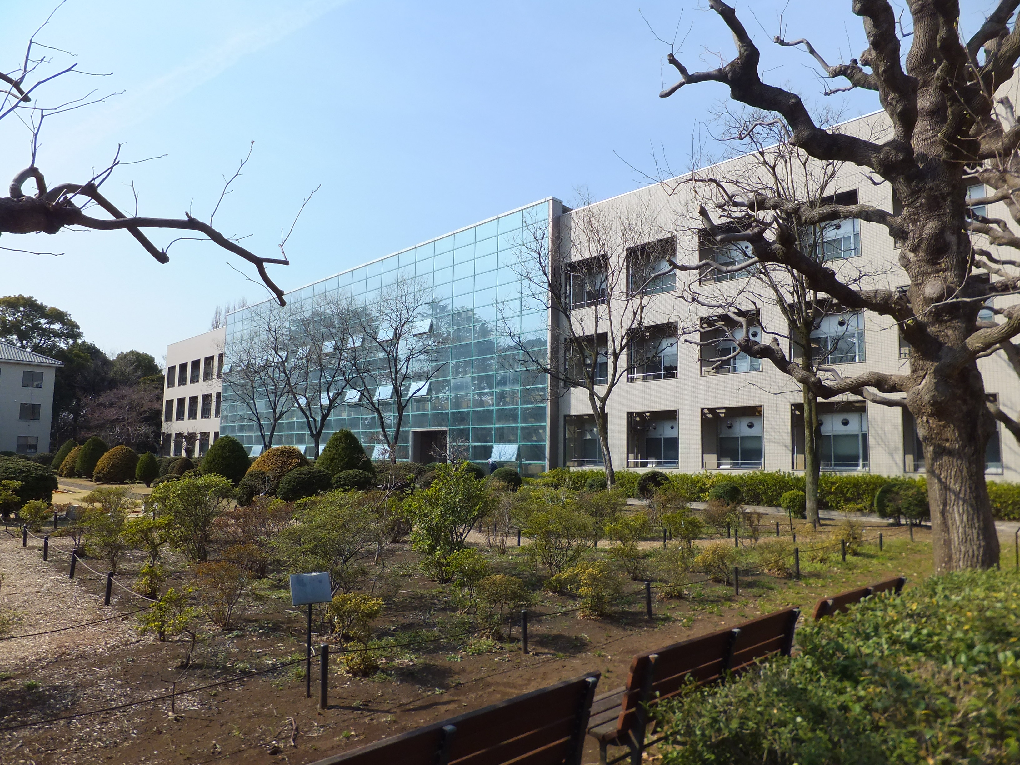 千葉大学松戸キャンパスB棟